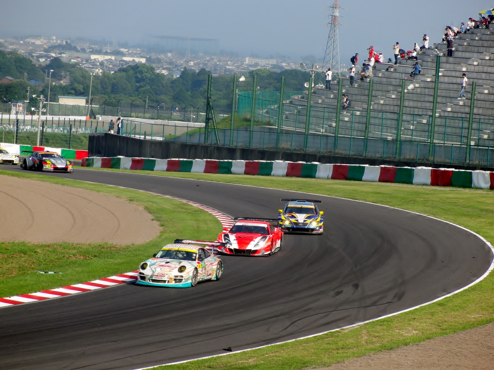 第39回インターナショナルポッカGTサマースペシャルに於けるワンシーンを撮影。尚、みんカラにもアップロードされている。